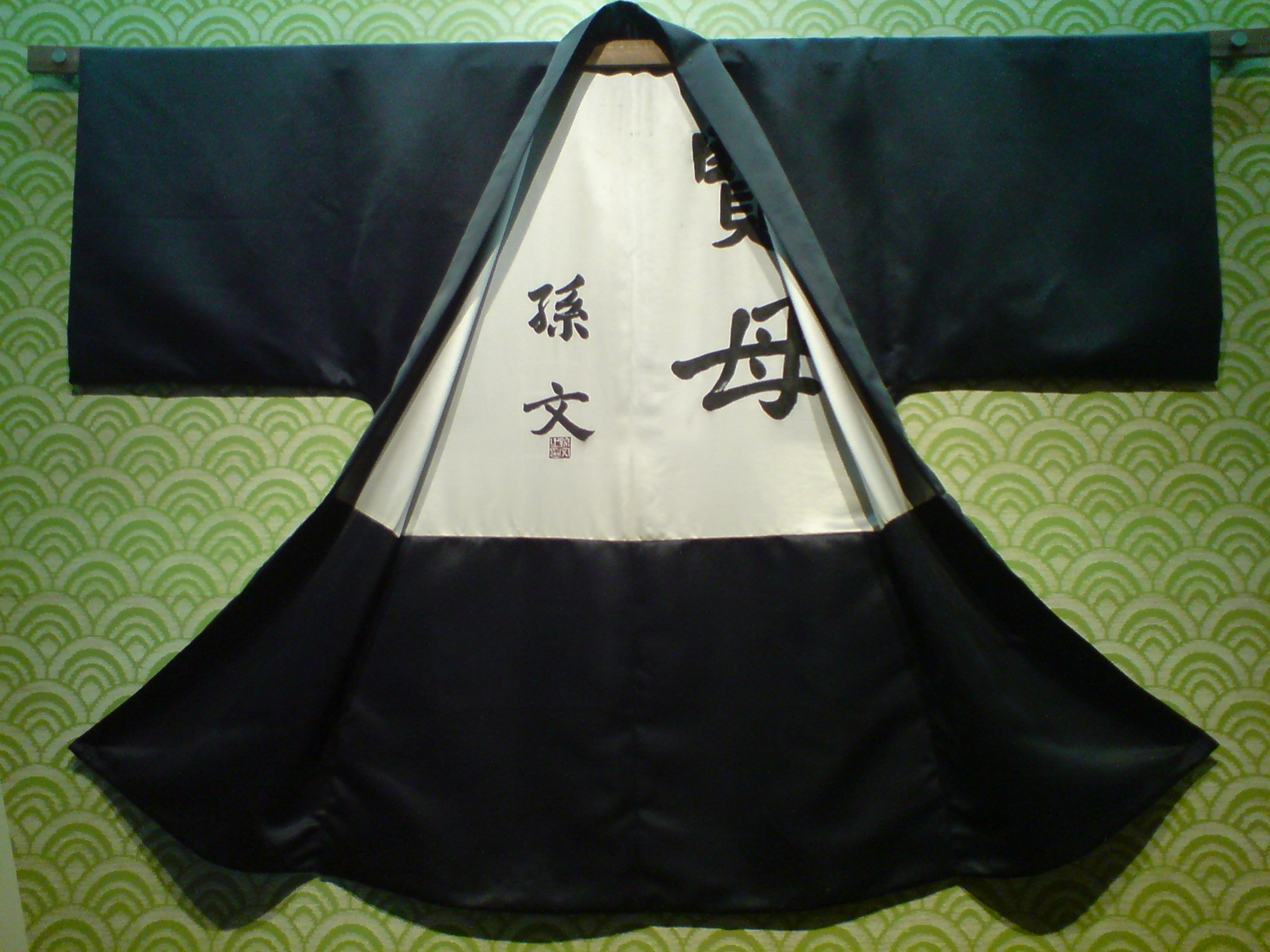 孙中山亲笔为梅屋庄吉题字“贤母”。此为收藏在广州长洲岛孙中山故居的复制品。